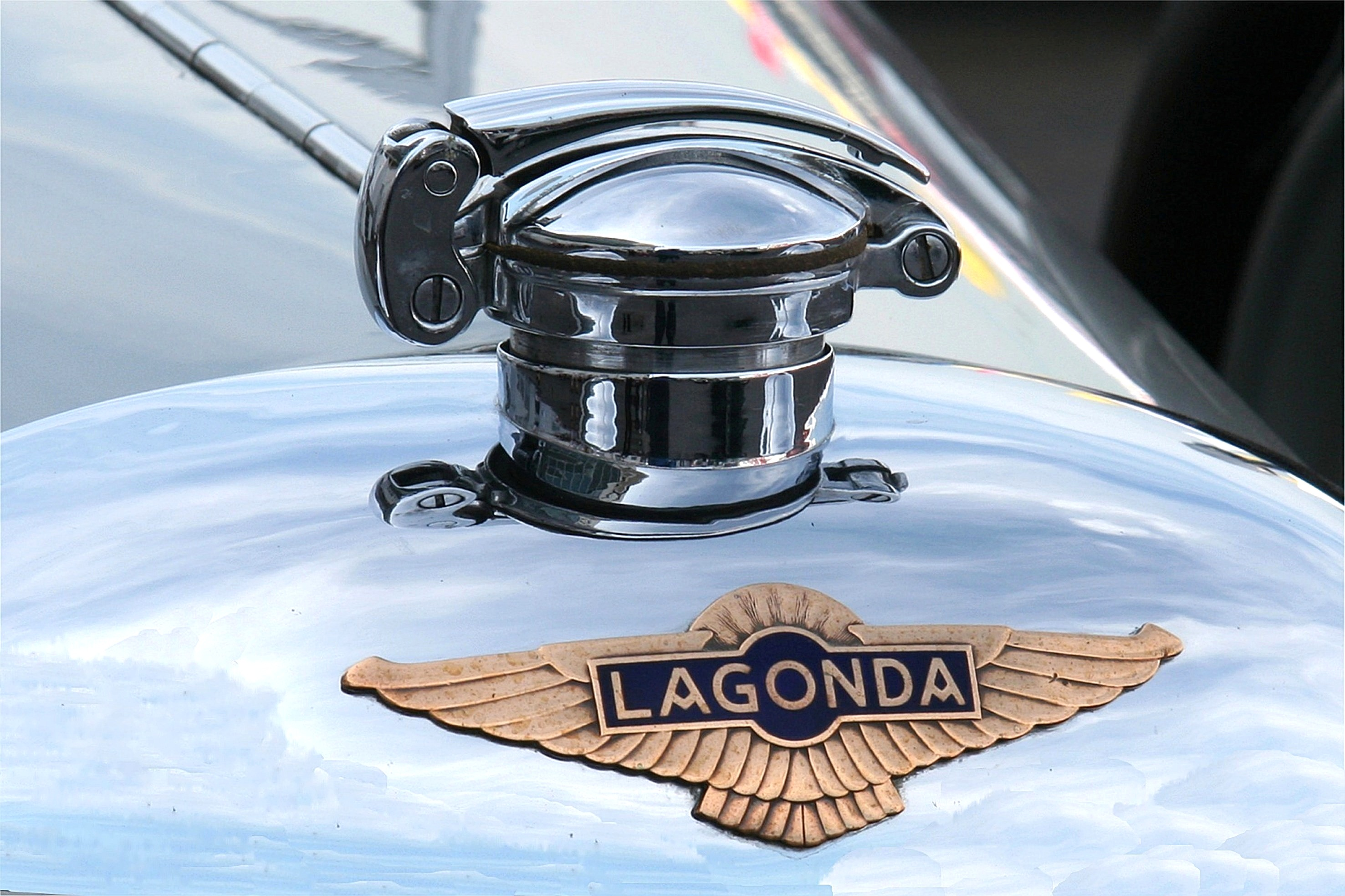 Kühlerverschluss und Logo eines Lagonda M45 Tourer, Baujahr 1933